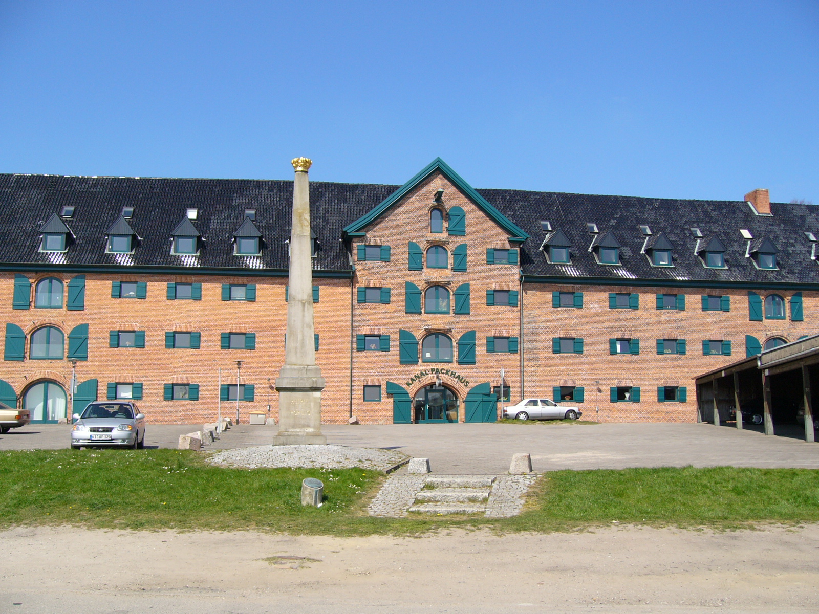 Das Kanalpackhaus stammt aus der Zeit des Eiderkanals, der 1784 fertiggestellt wurde. Das Lagerhaus ist 77 Meter lang. Heute enthält es Wohnung und ein Restaurant. Vor dem Packhaus steht ein Obelisk mit der Inschrift "Patriae et Populo". Auf dem Obelik befindet sich die dänische Krone.